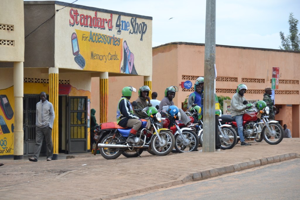 In Nyagatare